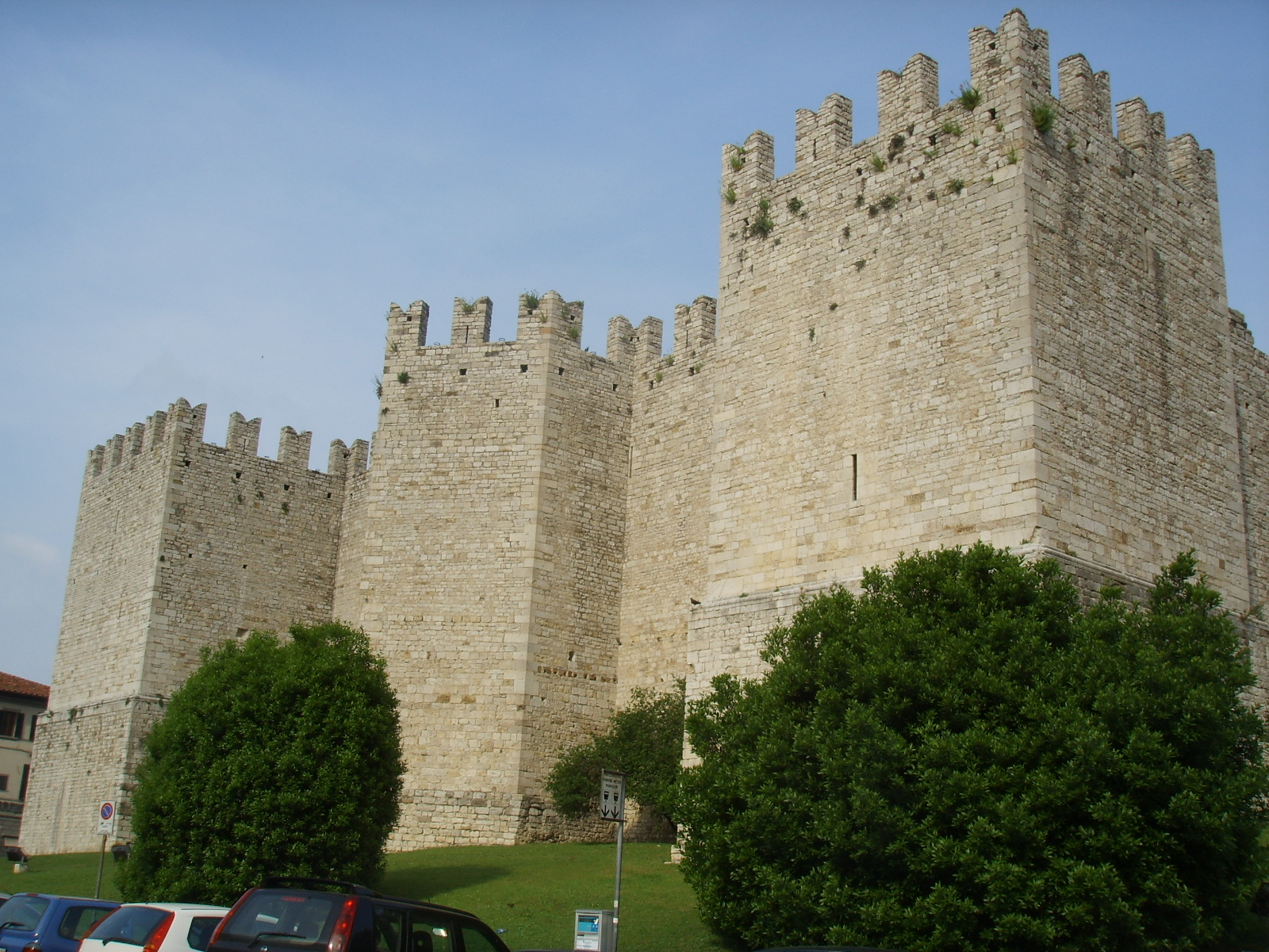 Castello dell'imperatore, lato